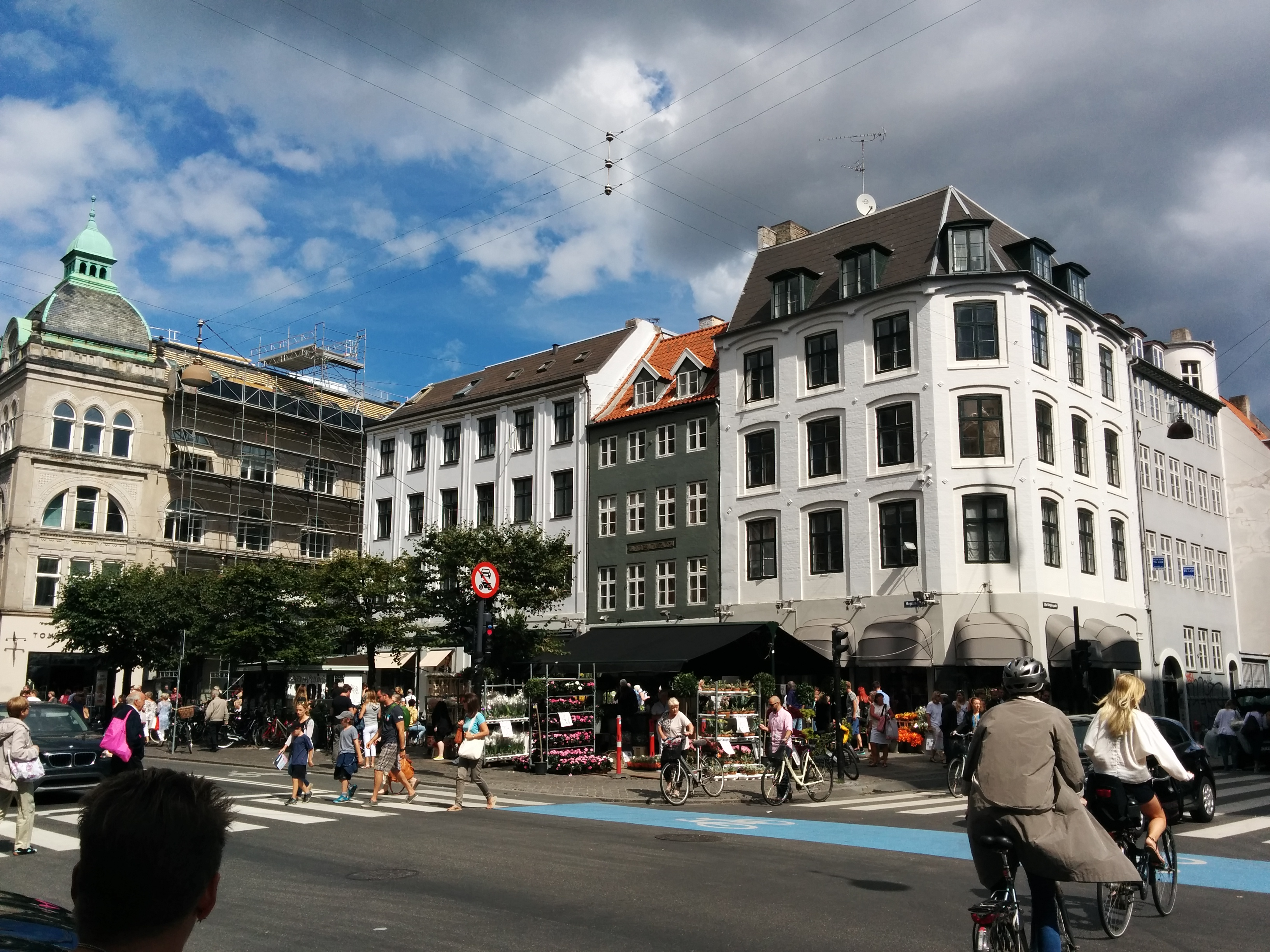 Magasins Torv in Copenhagen, Denmark